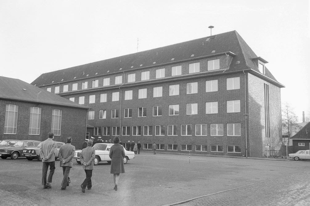 Bundeswehrfachschule in der Herthastraße 5-7